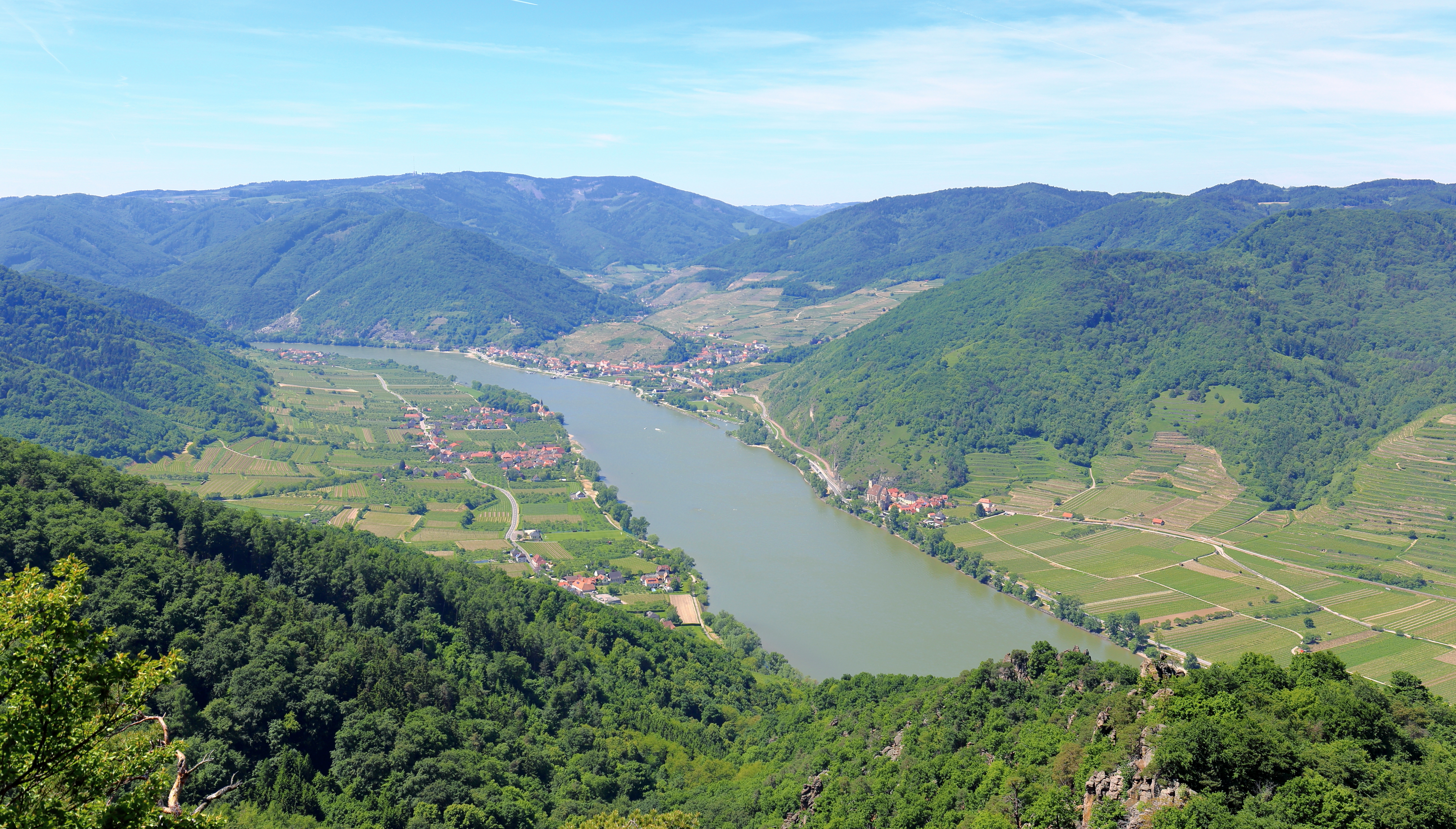 Die Wachau im Bereich Spitz an der Donau bzw. Blick vom Sonnstein, ein Vorgipfel des 671 Meter hohen Seekopfes, Richtung Westen.Links der Donau von vorne nach hinten die Ortschaften Bacharnsdorf, Mitterarnsdorf, Hofarnsdorf und Oberarnsdorf, die alle zur Marktgemeinde Rossatz-Arnsdorf gehören. Rechts der Donau im Vordergrund die Ortschaft St. Michael (Marktgemeinde Weißenkirchen in der Wachau) mit der Wehrkirche St. Michael bzw. "Mutterkirche der Wachau" und dahinter Spitz an der Donau.